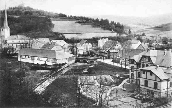 Blick auf Kirchhundem mit der um 1850 erbauten Hundembrücke. Rechts im Bildvordergrund das Amtshaus.